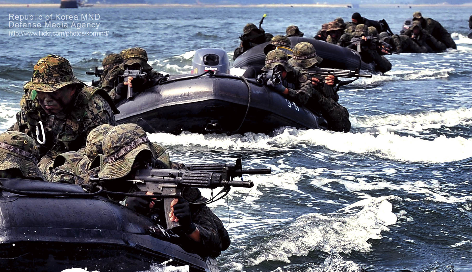 육군 특전사 귀성부대 장병들이 8일 오후 충남 태안군 안면도 해상엥서 보트를 타고 고강도 해상침투 훈련을 하고 있다. 촬영 - 박흥배 기자